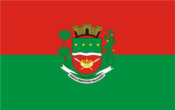 imagem da bandeira do municipio de José Bonifácio - SP